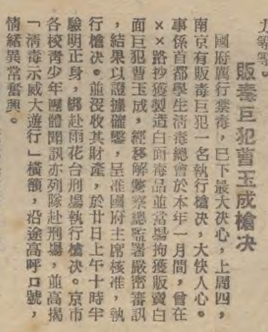 题名： 贩毒巨犯曹玉成枪决 文献来源： 《中国周报》 出版时间： 1944 年 卷期(页)： [ 第124期 ，2页 ] 中图分类号： C55